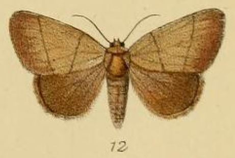 Neonegeta pollusca (Schaus & Clements, 1893)